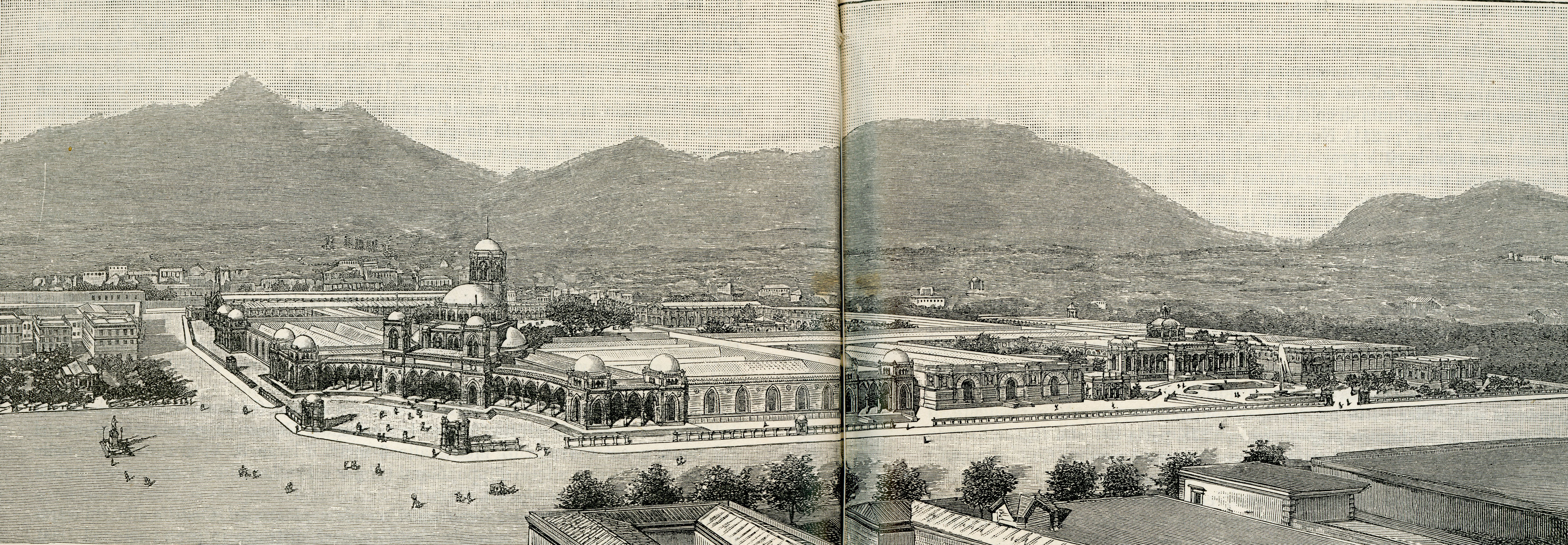 Veduta a volo d’uccello dell’ Esposizione Nazionale di Palermo (1891-92) (incisore anonimo 1891).